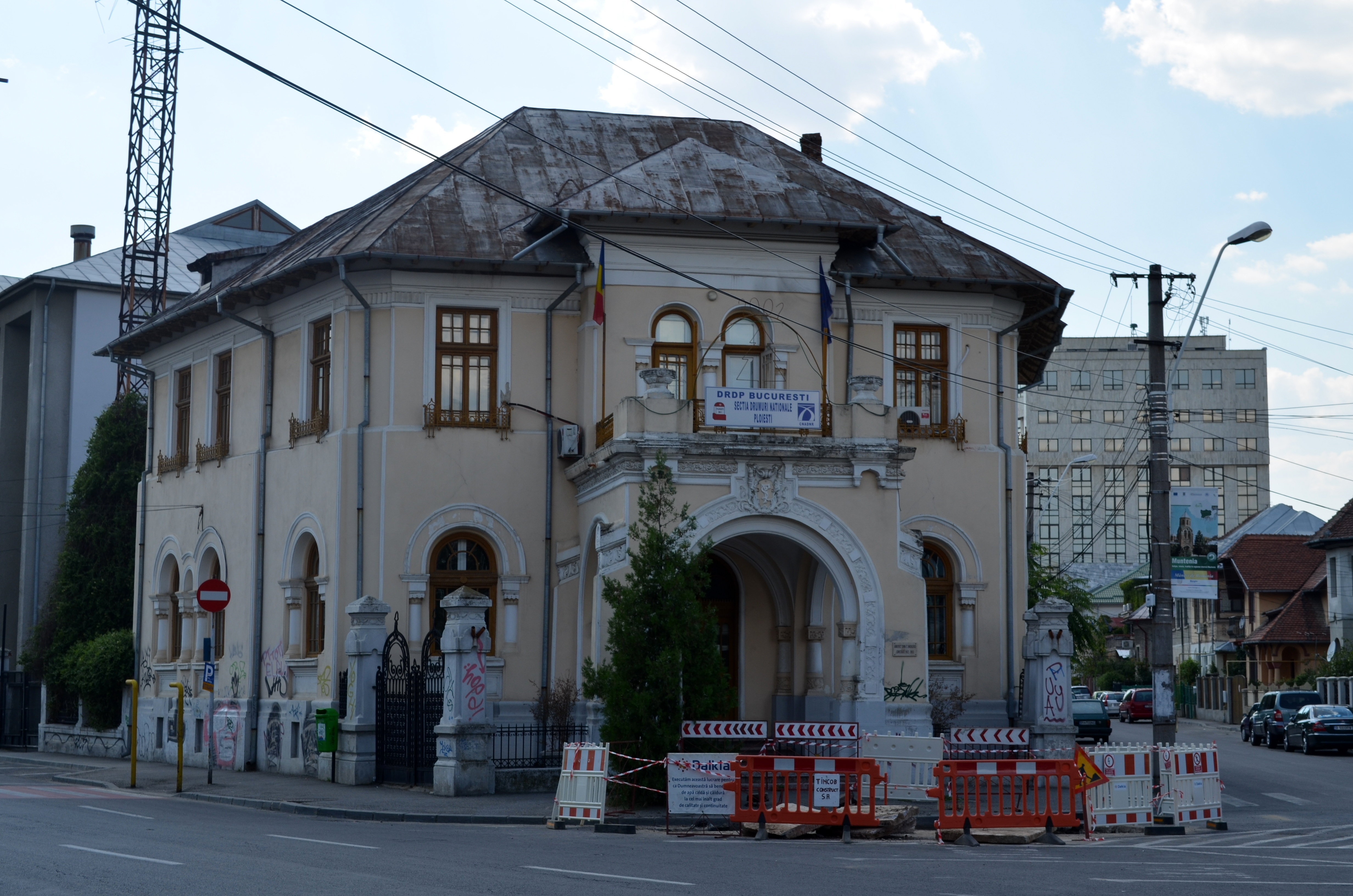 Casă, Str. Maramureș nr. 8, azi sediul Secției Drumuri Naționale Ploiești